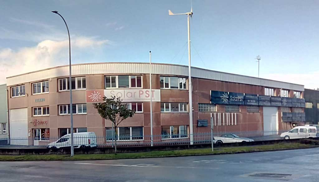 Solar PST no polígono de Bergondo.